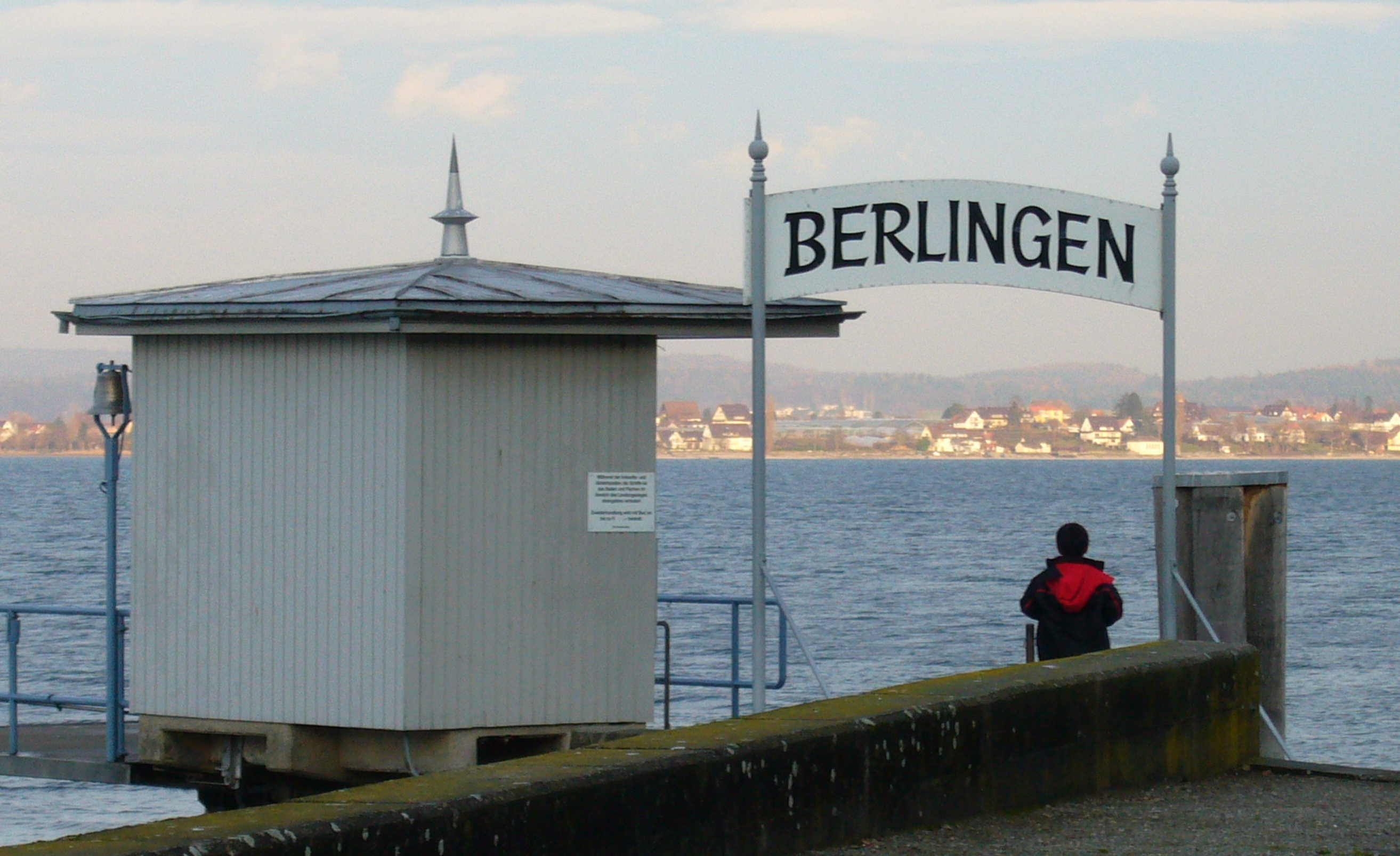 Berlingen, Schifflände am Untersee, Kanton Thurgau